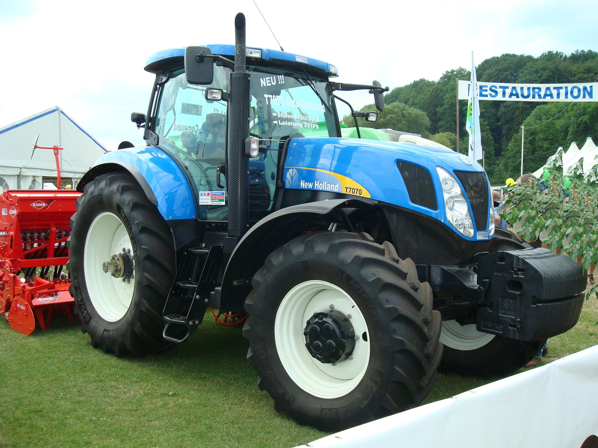 New-Holland-Traktor T7070